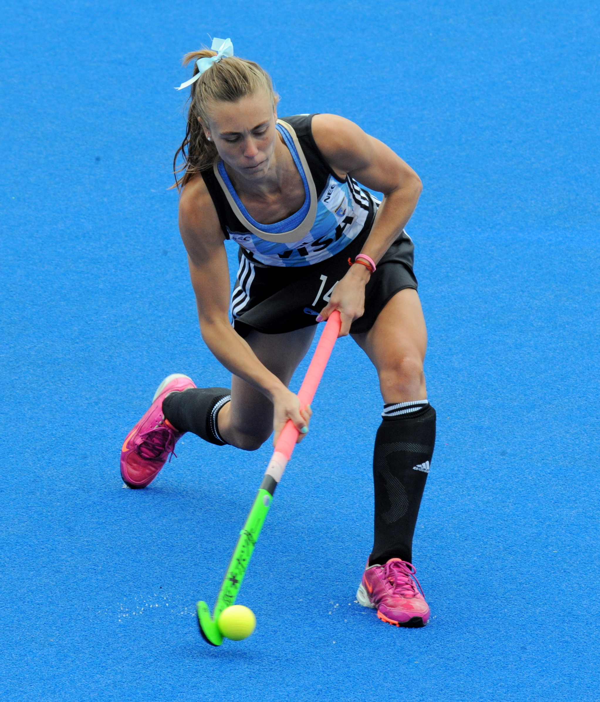 GB v Argentina 2016 CT